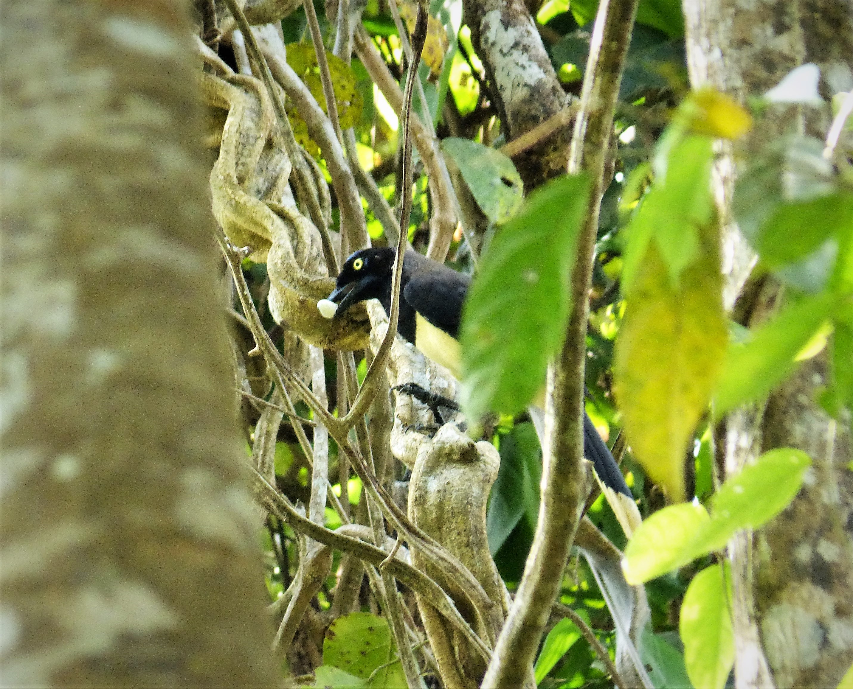 Vigia Garden, Nr Torti, Darien Province, Panama